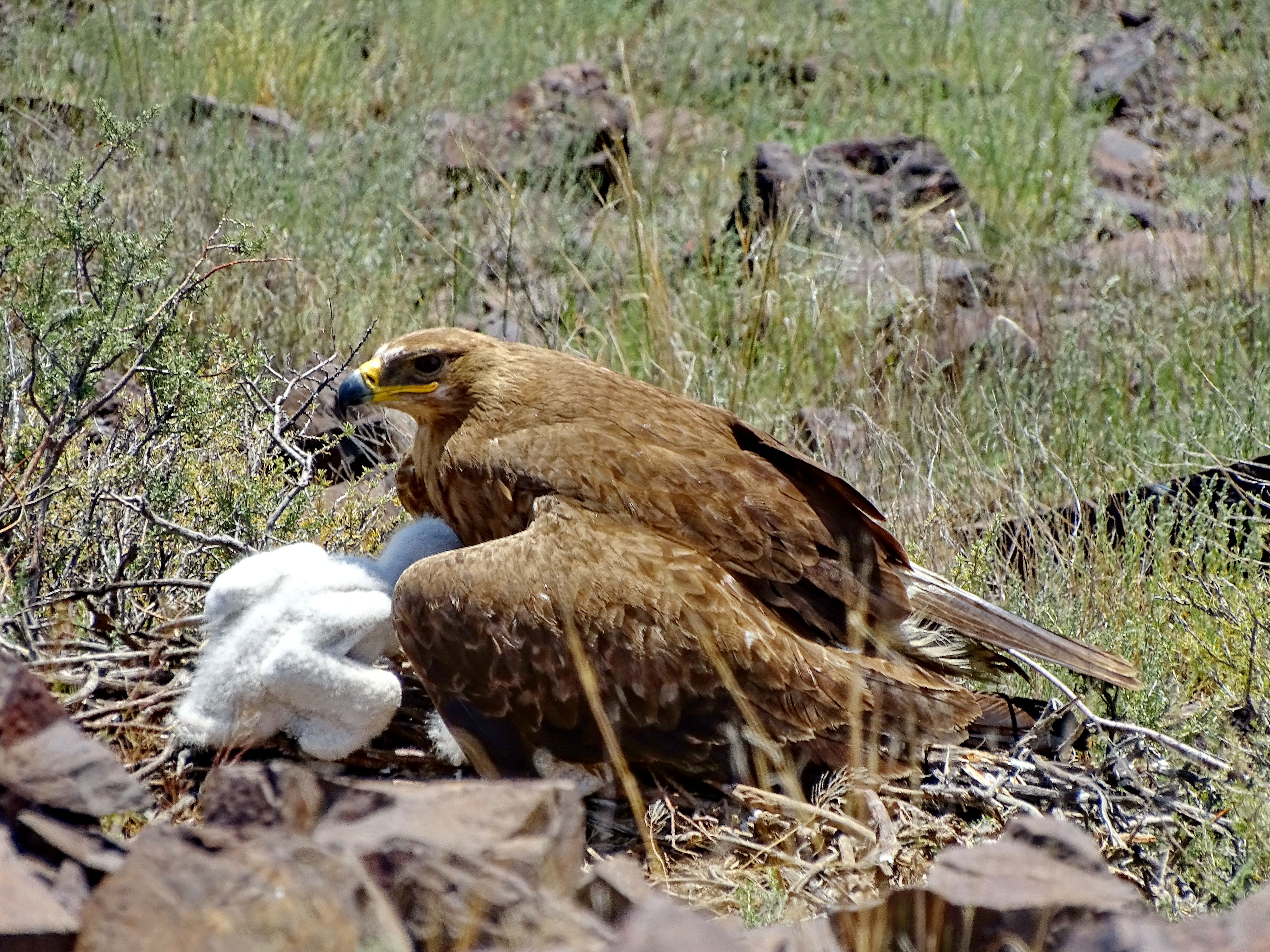 Степной орел (Aquila nipalensis). Самка с пуховым птенцом на гнезде на земле. Северное Прибалхашье